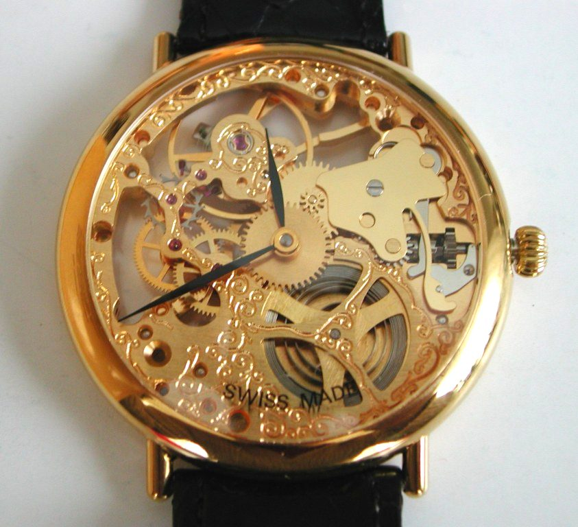 Skelettierte Armbanduhr